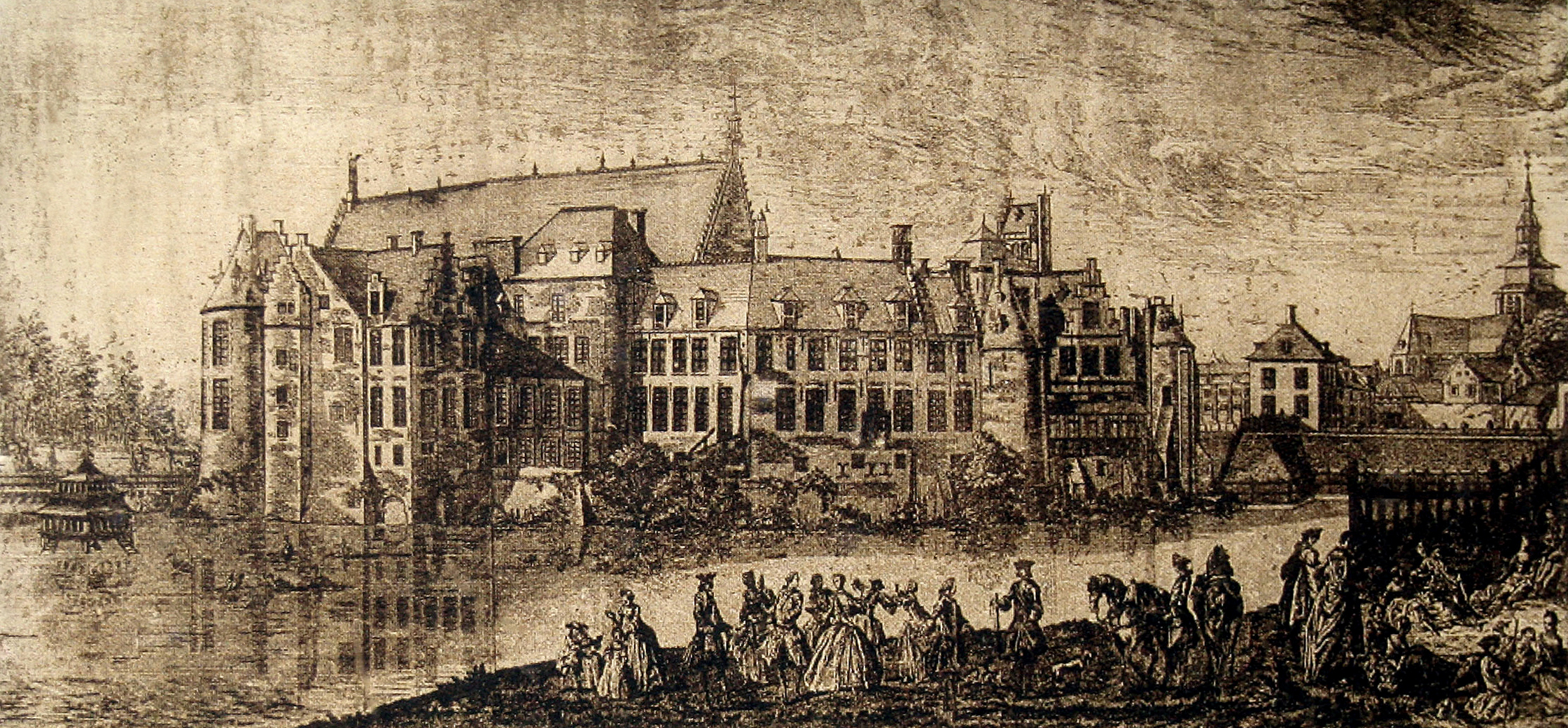 Gravure de l'ancien château des ducs de Brabant à Tervueren (Belgique) - XVIIIe siècle.